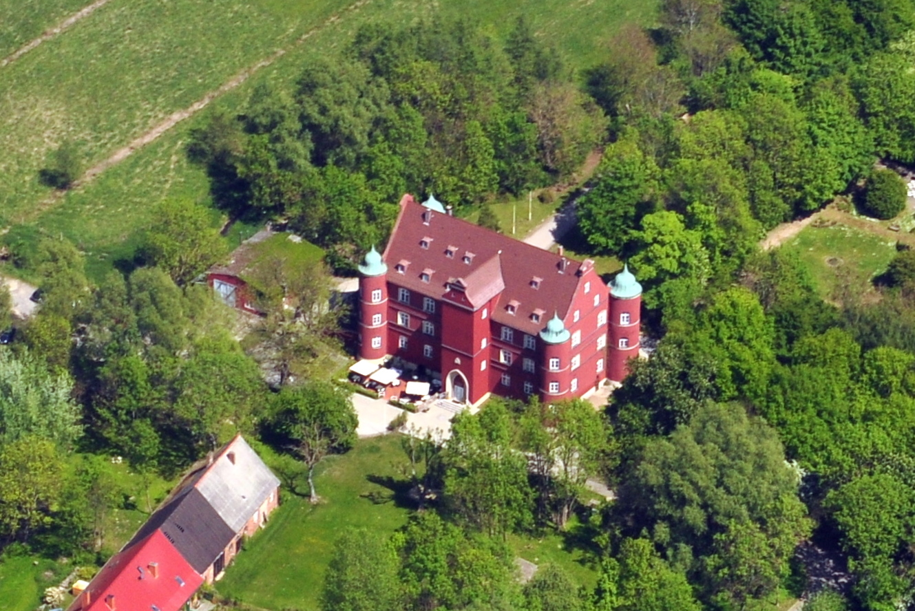 Die Bilder wurden von mir während eines einstündigen Rundflugs ab Flugplatz Güttin am 21. Mai 2011 aufgenommen. Die Bildbeschreibung steht im Dateinamen. Aufgenommen mit einer Nikon D5000 durch das Seitenfenster des Flugzeugs.